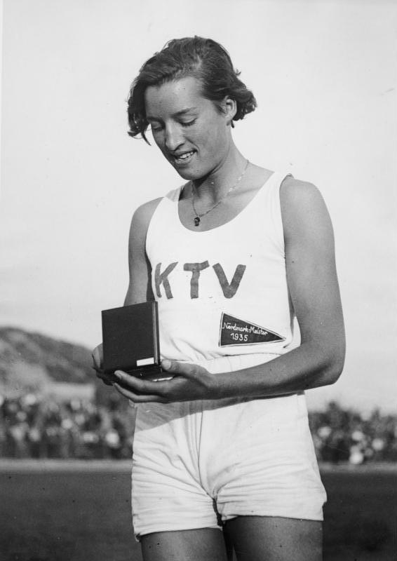 Berlin, Hochspringerin Elfriede Kaun Scherl- Sportbild Schirmer Elfriede Kaun gewann den Hochsprung! Glänzender Beginn der deutschen Leichtathletikmeisterschaften auf dem SCC-Platz in Berlin. UBz: die neue Hochsprungmeisterin Elfriede Kaun (Kiel) besieht sich den Siegespreis 26213-35 [1935] Abgebildete Personen: Kaun, Elfriede: Hochspringerin, Deutschland